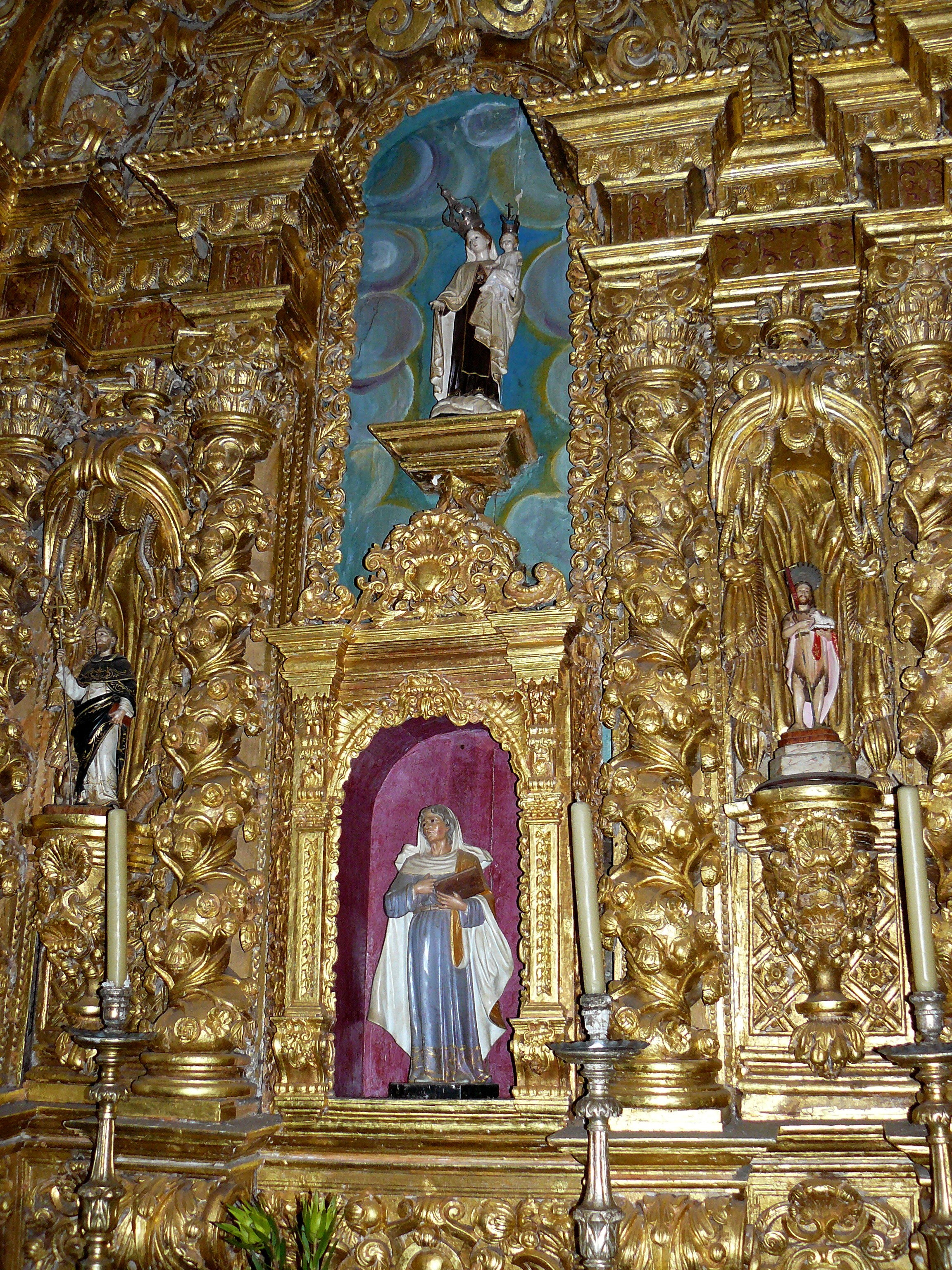 Eglise de São Jorge (Santana, Madère, Portugal)